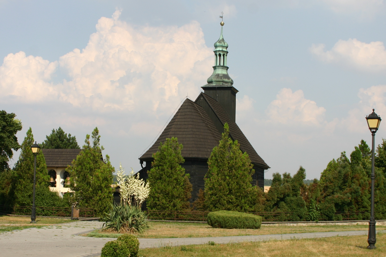 Kirche in Malnia (deutsch Mallnie).